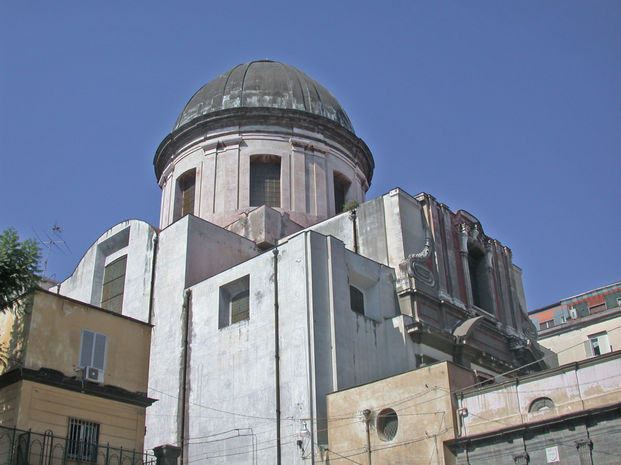 Italia, regione Campania, chiesa di Santa Maria Maggiore, cupola